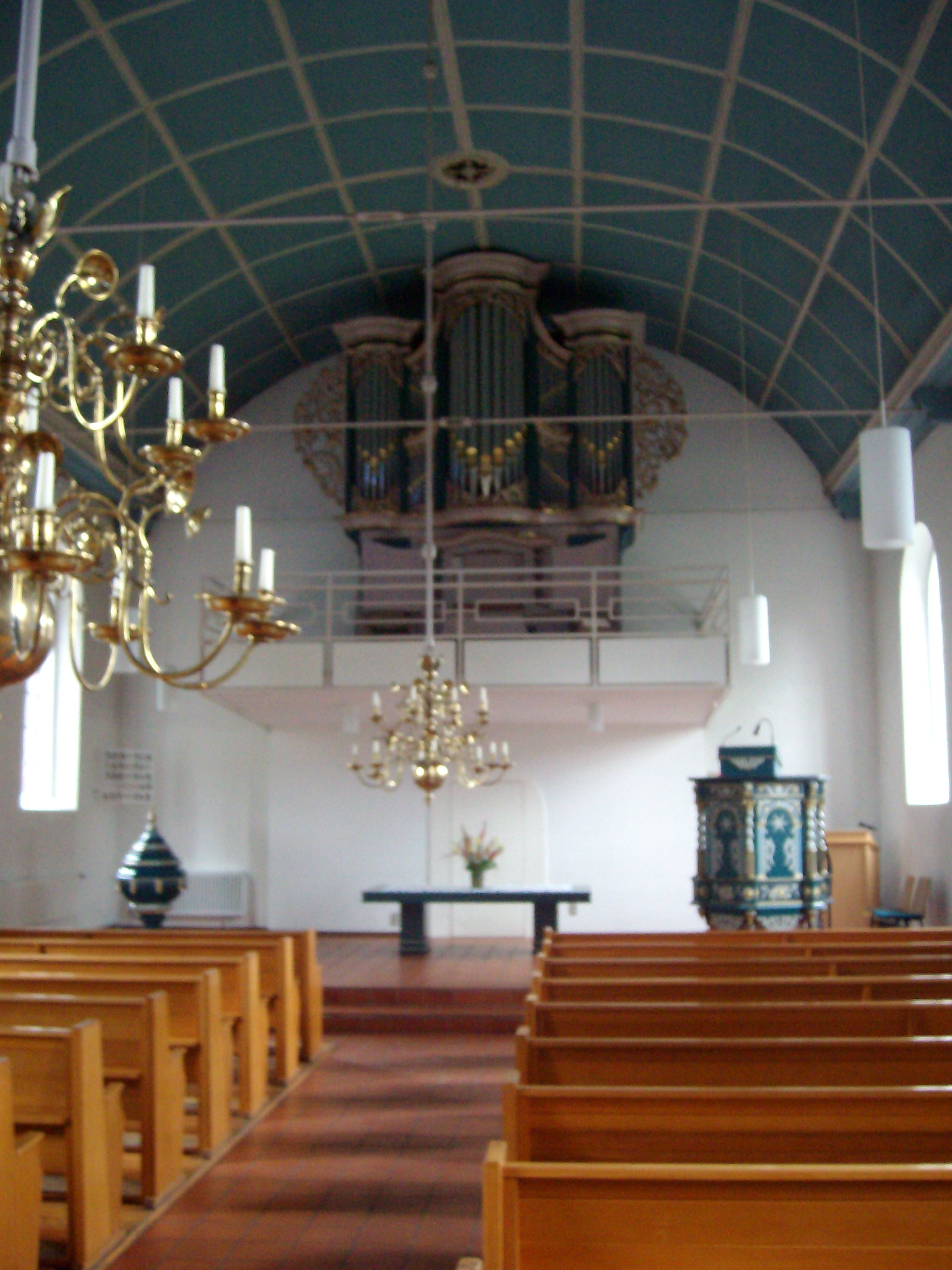 Innenraum Reformierte Kirche in Neermoor